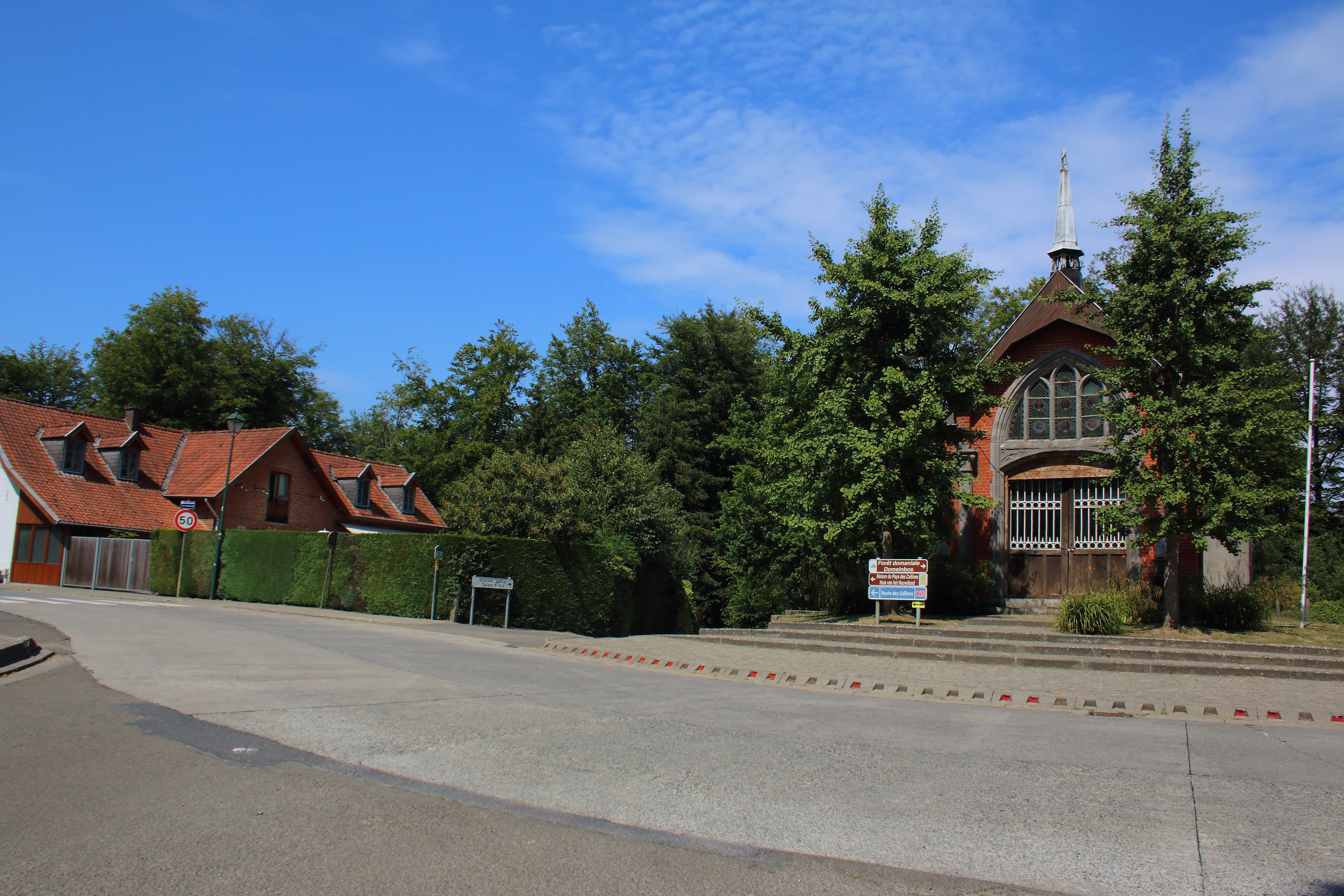 La Houppe - D'Hoppe, Flobecq - Vloesberg, Henegouwen, Wallonië, België